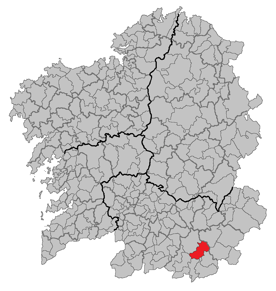 Mapa coa localización do concello de Castrelo do Val.